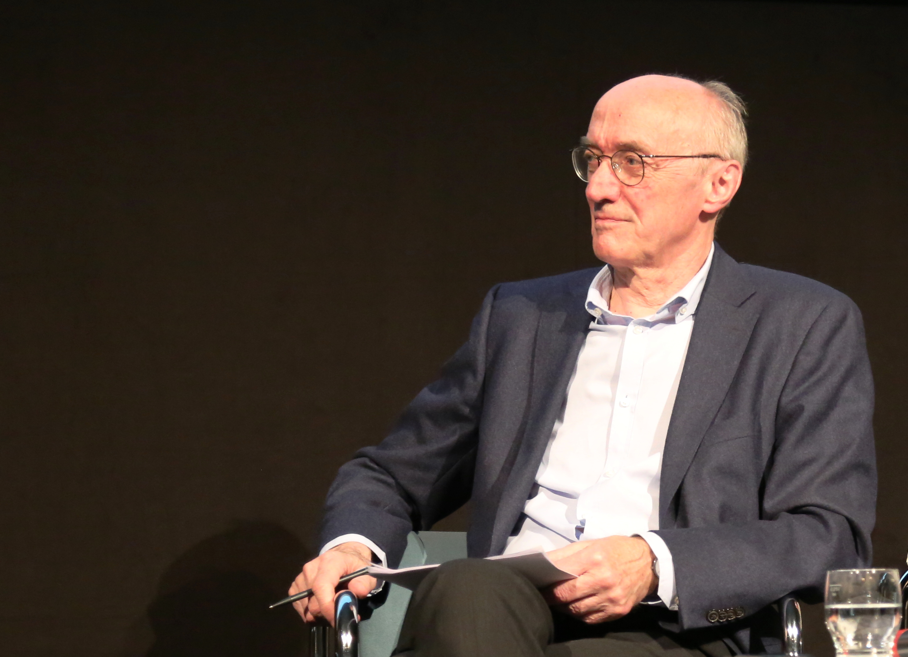 Winfried Nerdinger, Direktor des NS-Dokumentationszentrums München, Architekt, Professor an der Technischen Universität München, Mitglied der Bayerischen Akademie der Schönen Künste